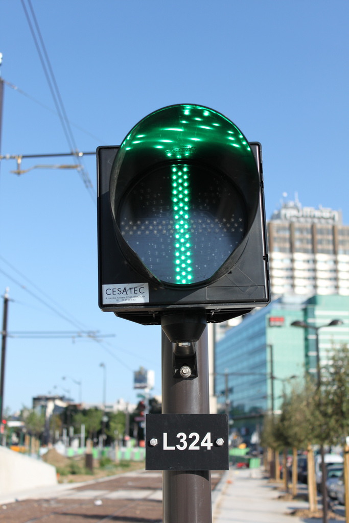 Signalisation sur la ligne 2 du tramway d'Île-de-France